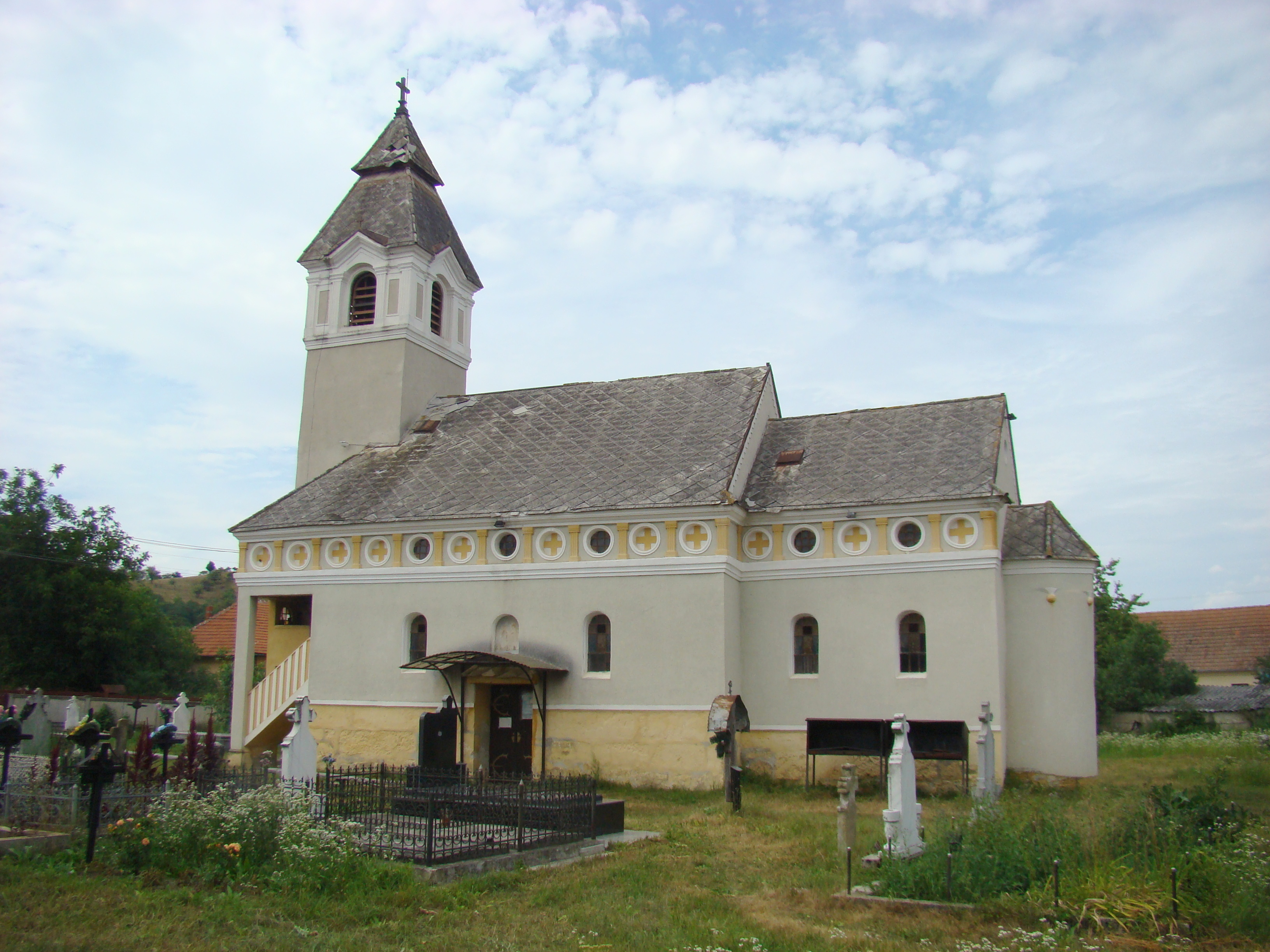 Biserica „Sfântul Prooroc Ilie”, sat Peșteana; comuna Densuș